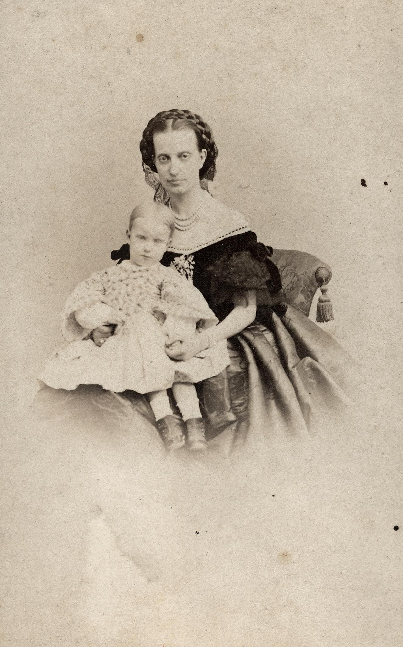 Erzherzogin Isabella von Österreich-Toskana mit ihrer ältesten Tochter Prinzessin Antonia von Neapel-Sizilien